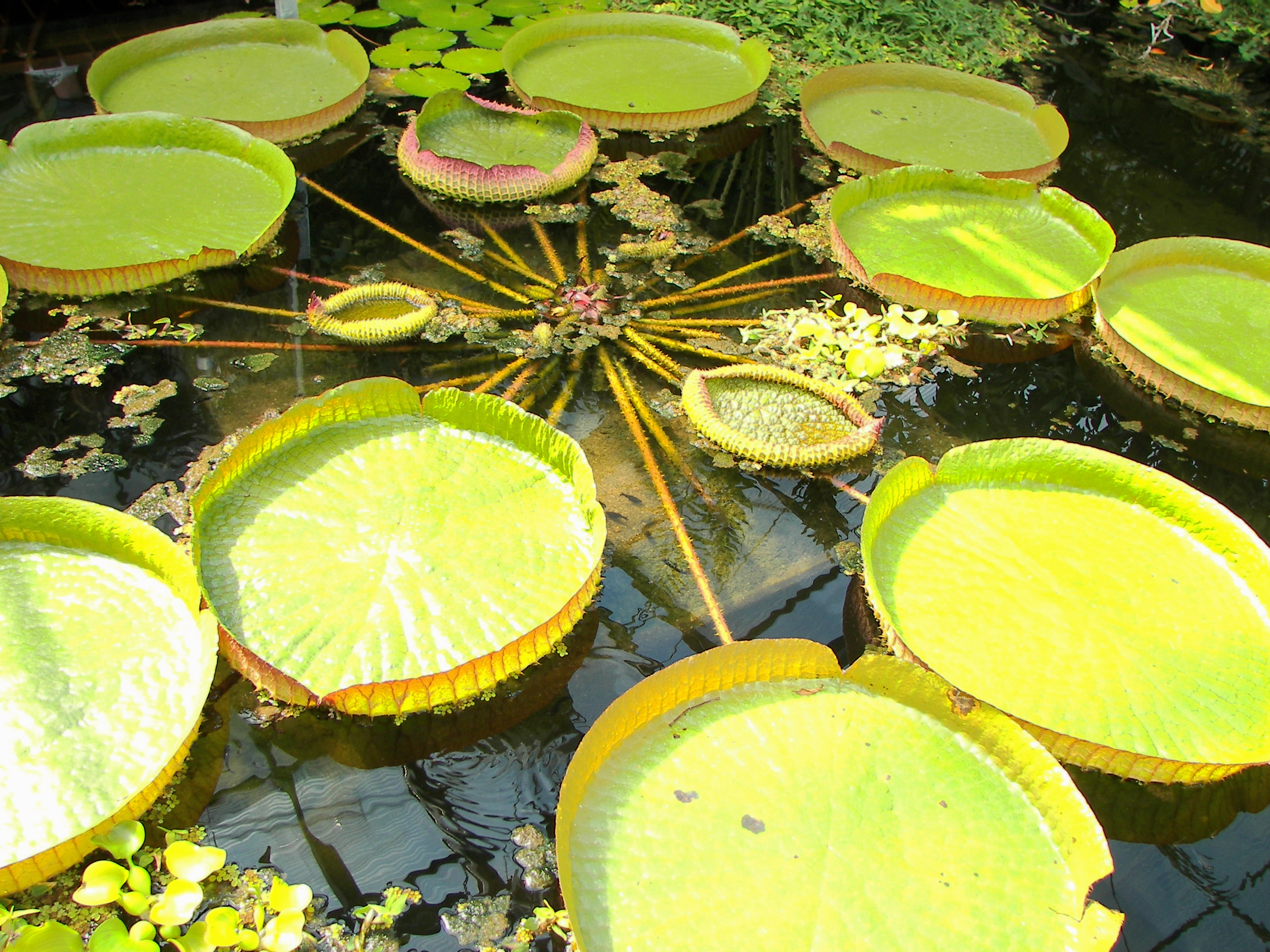 Riesenseerose (Victoria amazonica) im Neuen Botanischen Garten Marburg